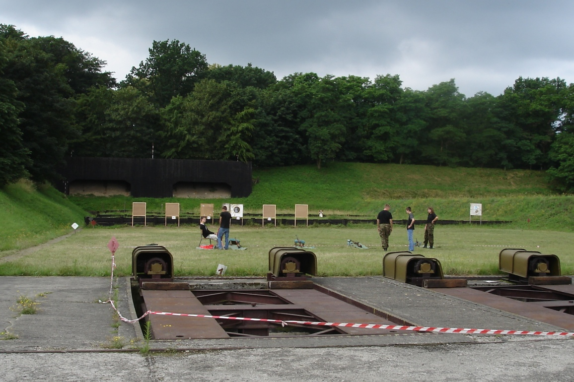 Stargard, 2007. Strzelnica jednostek kompleksu czerwonych koszar, w tym 8br